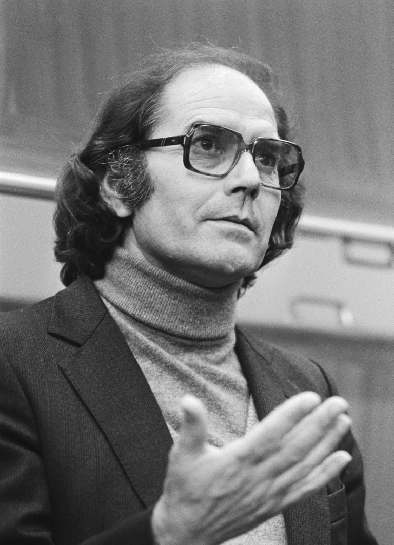 Adolfo Pérez Esquivel, Nobelprijswinnaar voor de vrede in 1980 geeft een lezing in de VU in Amsterdam